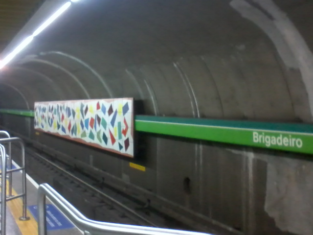 Plataforma da estação de Metrô Brigadeiro, em São Paulo